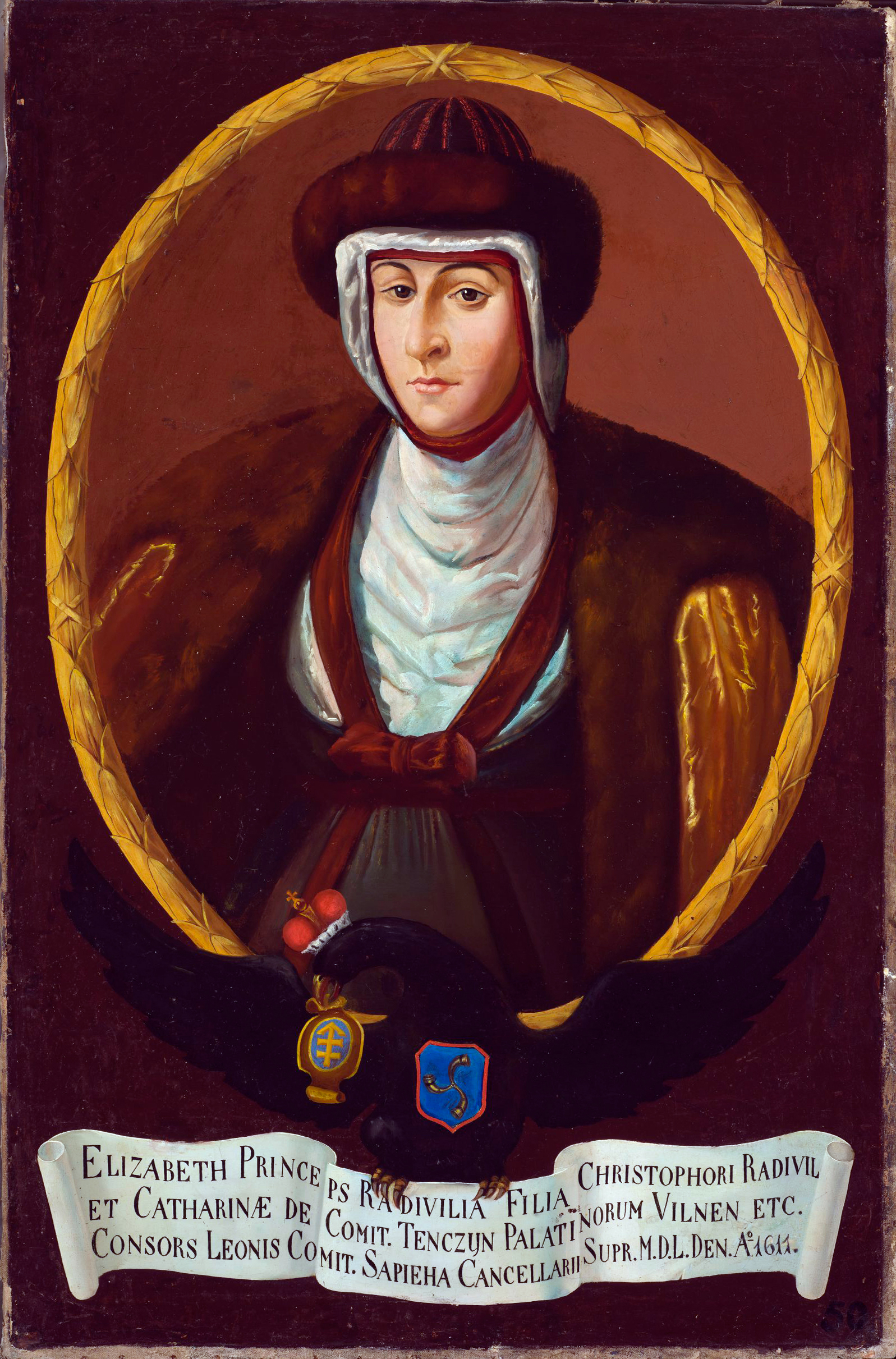 Беларуская (тарашкевіца): Партрэт Альжбеты Сапегі (Alžbieta Sapieha) з князёў Радзівілаў (Radzivił)